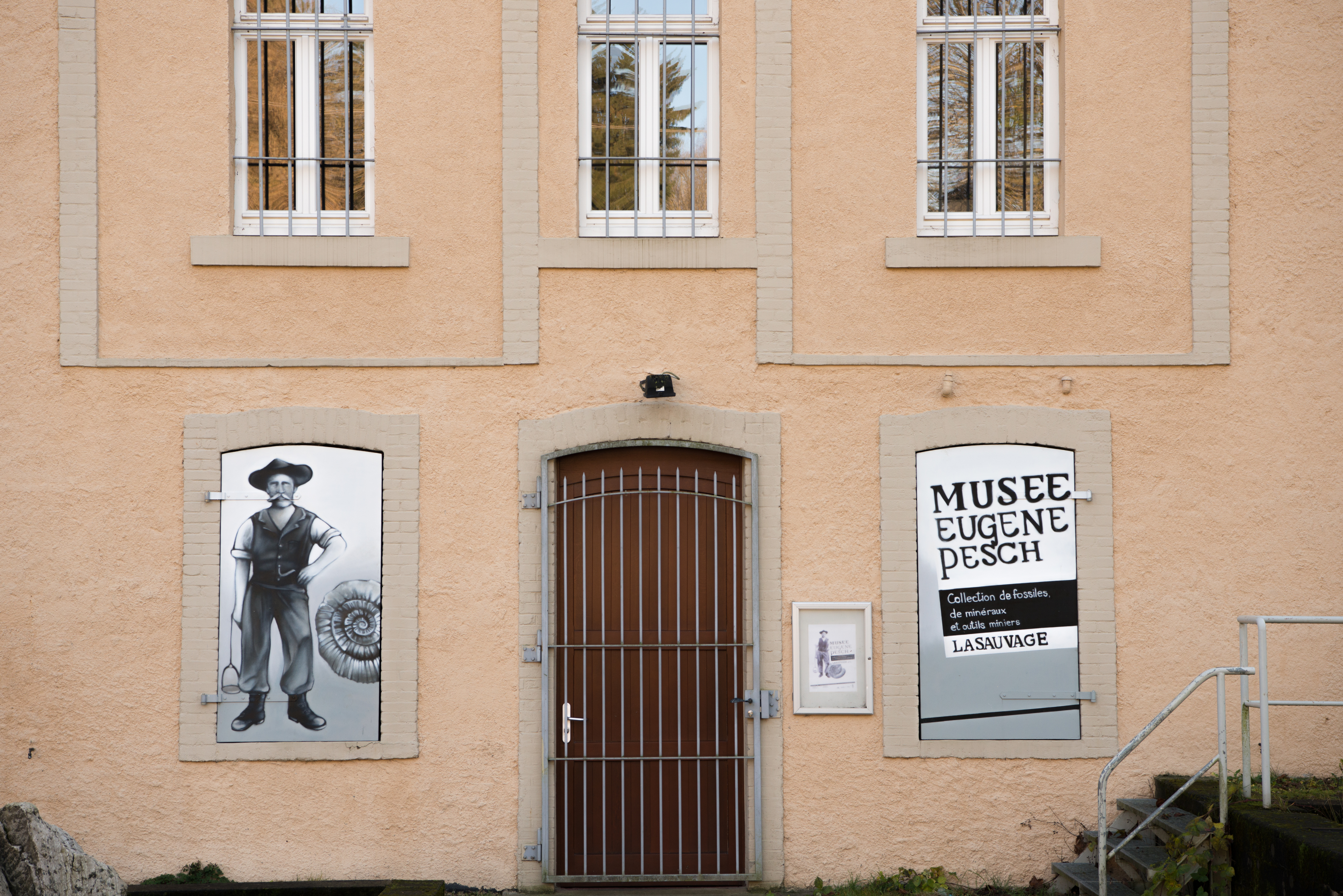 De Musée Eugène-Pesch zu Zowaasch.